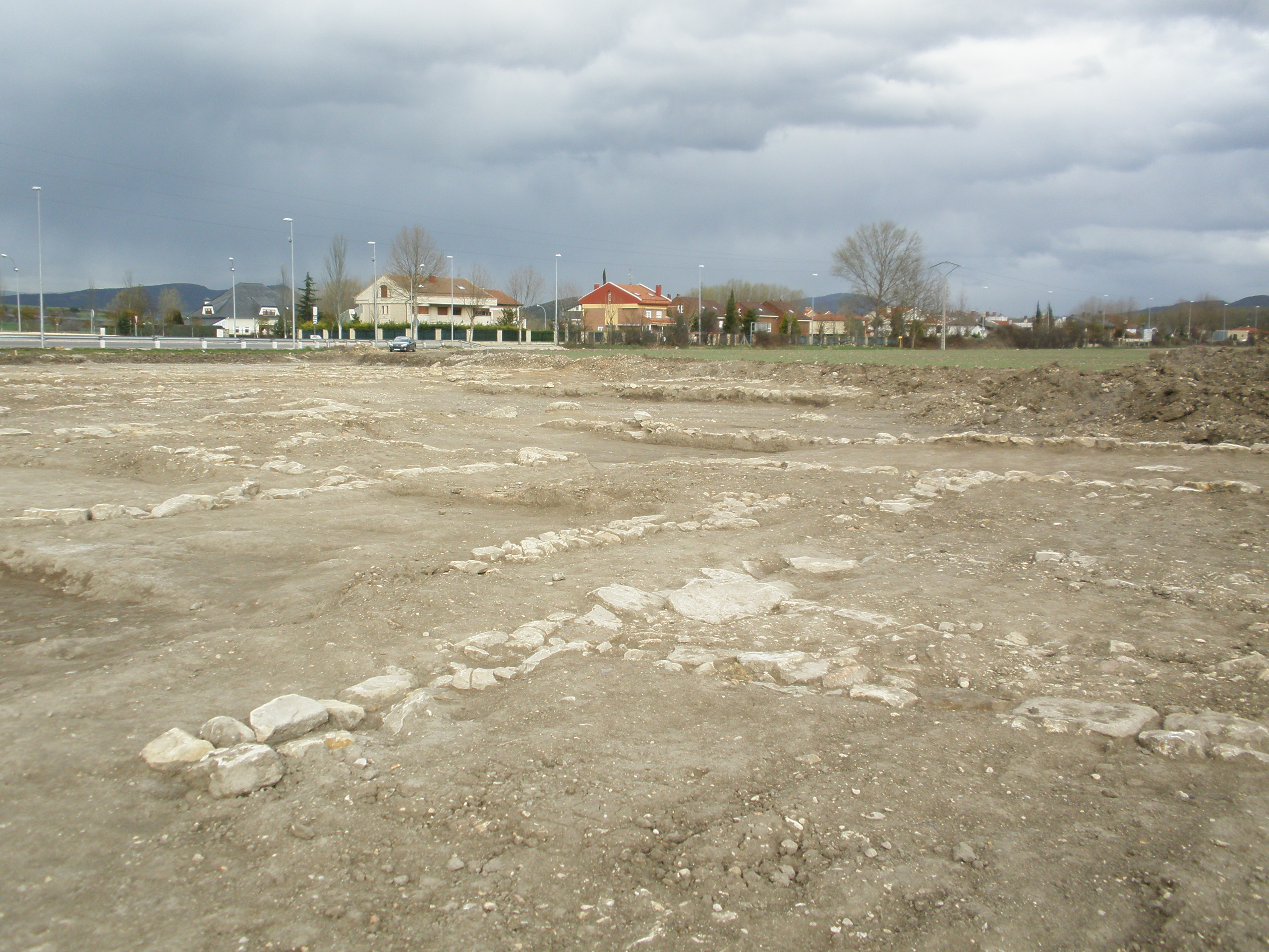 Restos arqueológicos romanos correspondientes a Deóbriga en el yacimiento de Arce-Mirapérez (Miranda de Ebro, España).